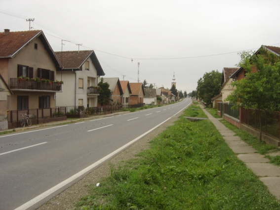 Glavna ulica u Baranjskom Petrovom Selu